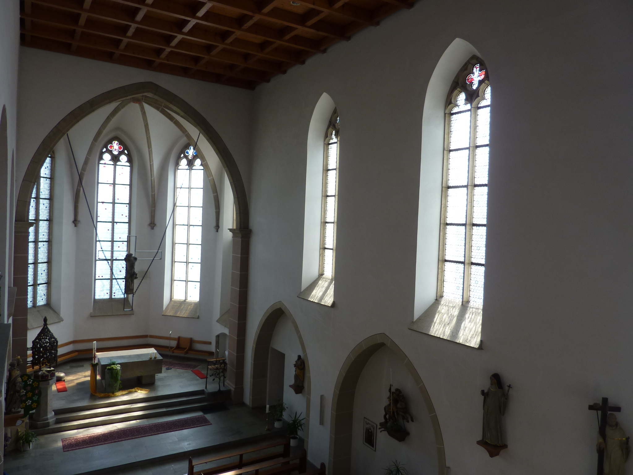 St. Katharina (St. Katharinen-Hilkerscheid)